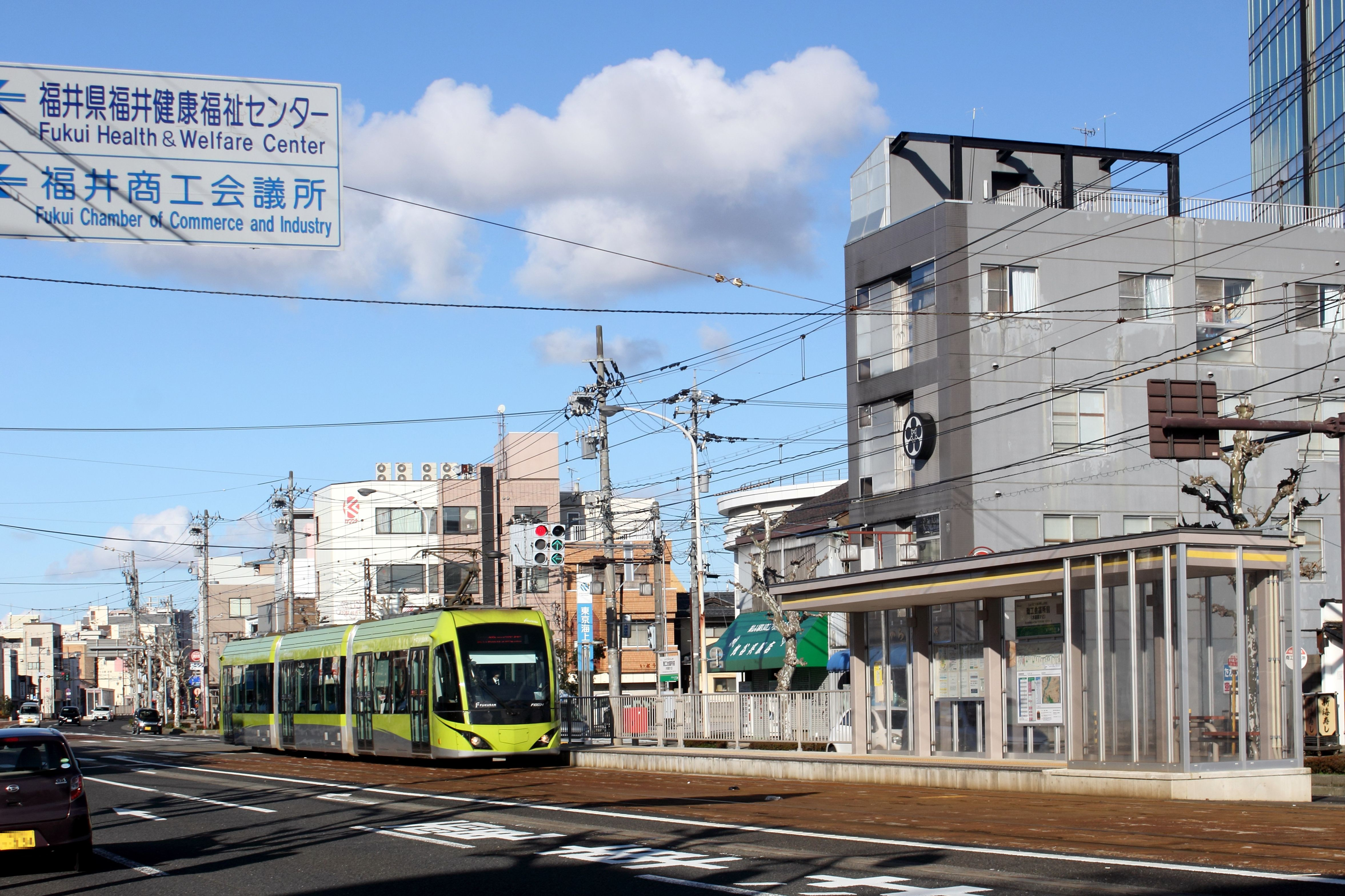 福井鉄道福武線 商工会議所前駅（越前武生方面）